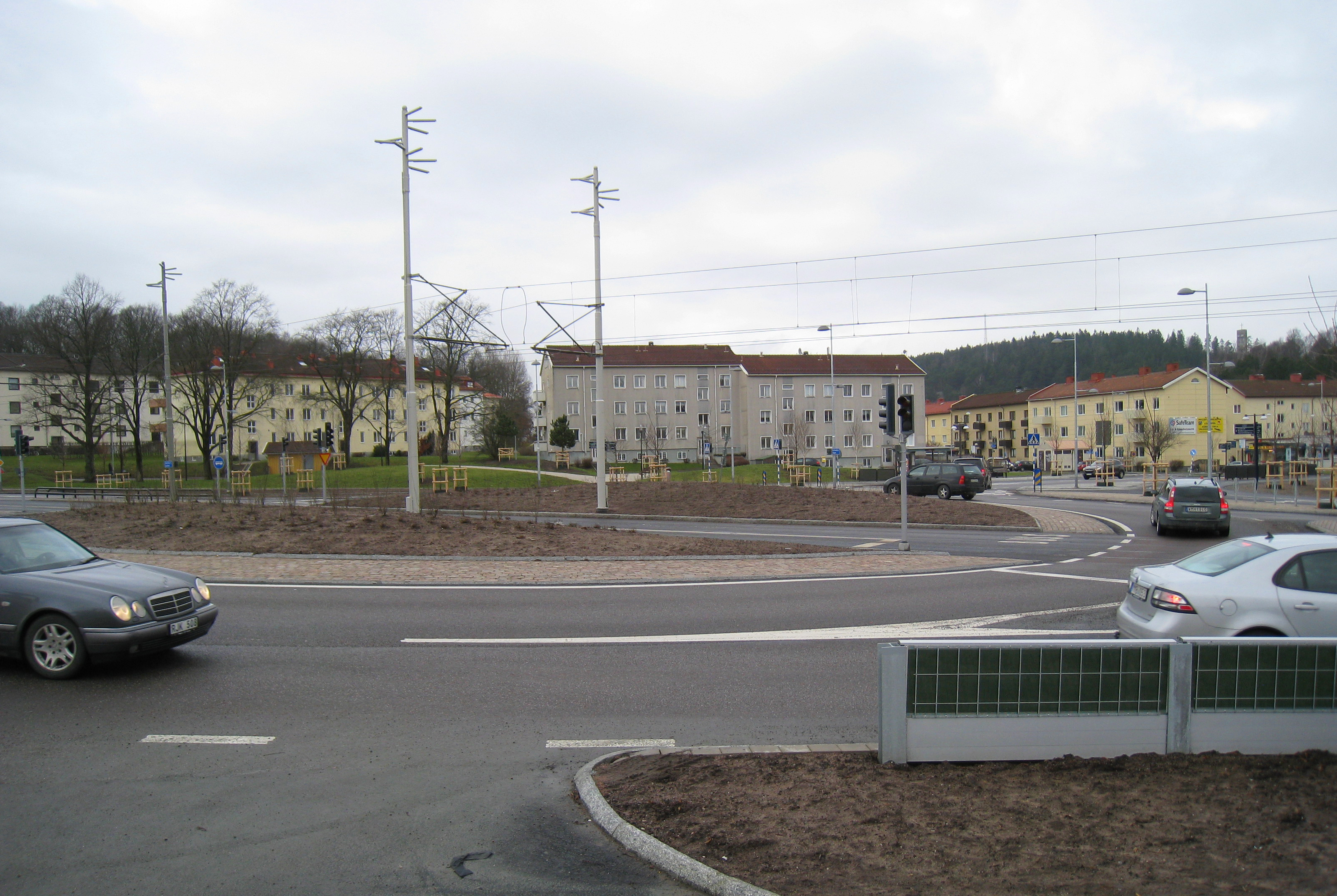 Bellevue, Göteborg. Trafikplats.